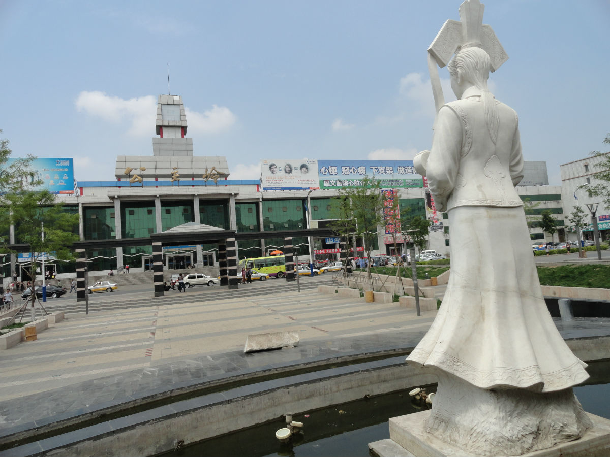 公主岭市火车站